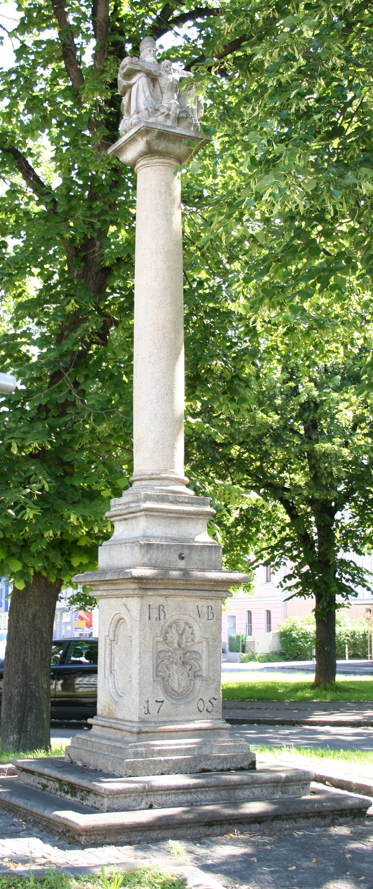 Gnadenstuhl in Linz-Lustenau, Bulgariplatz